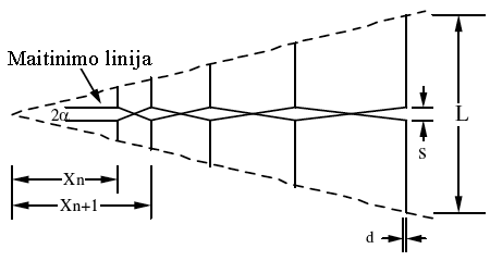 Logoperiodinės antenos elementų jungimo schema